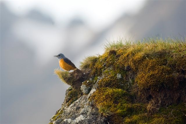 Thierry Leroy